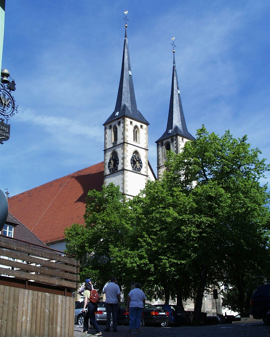 Bilder aus Bad Wimpfen